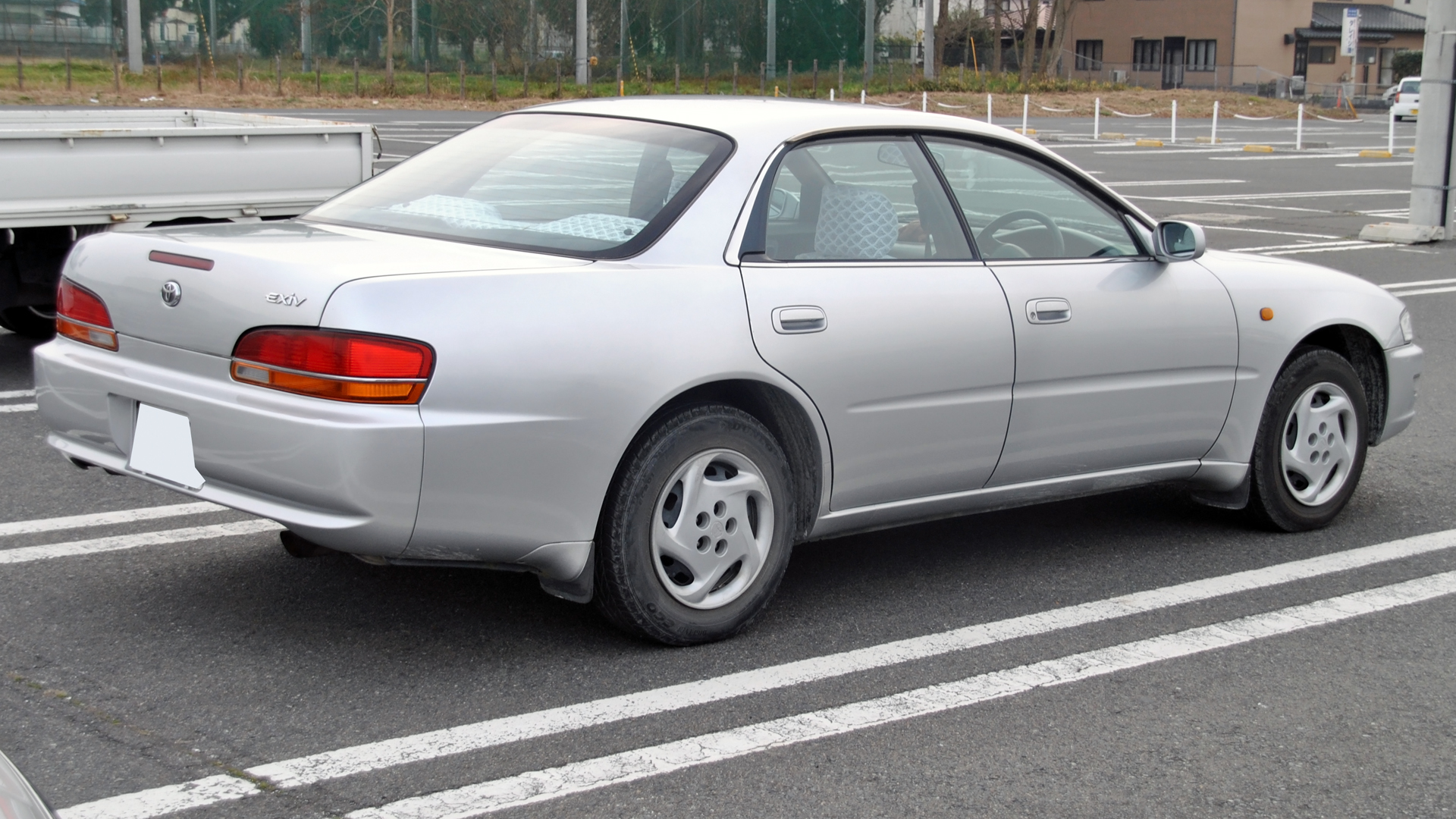 トヨタ・コロナEXiV（2代目・後期, ST200）